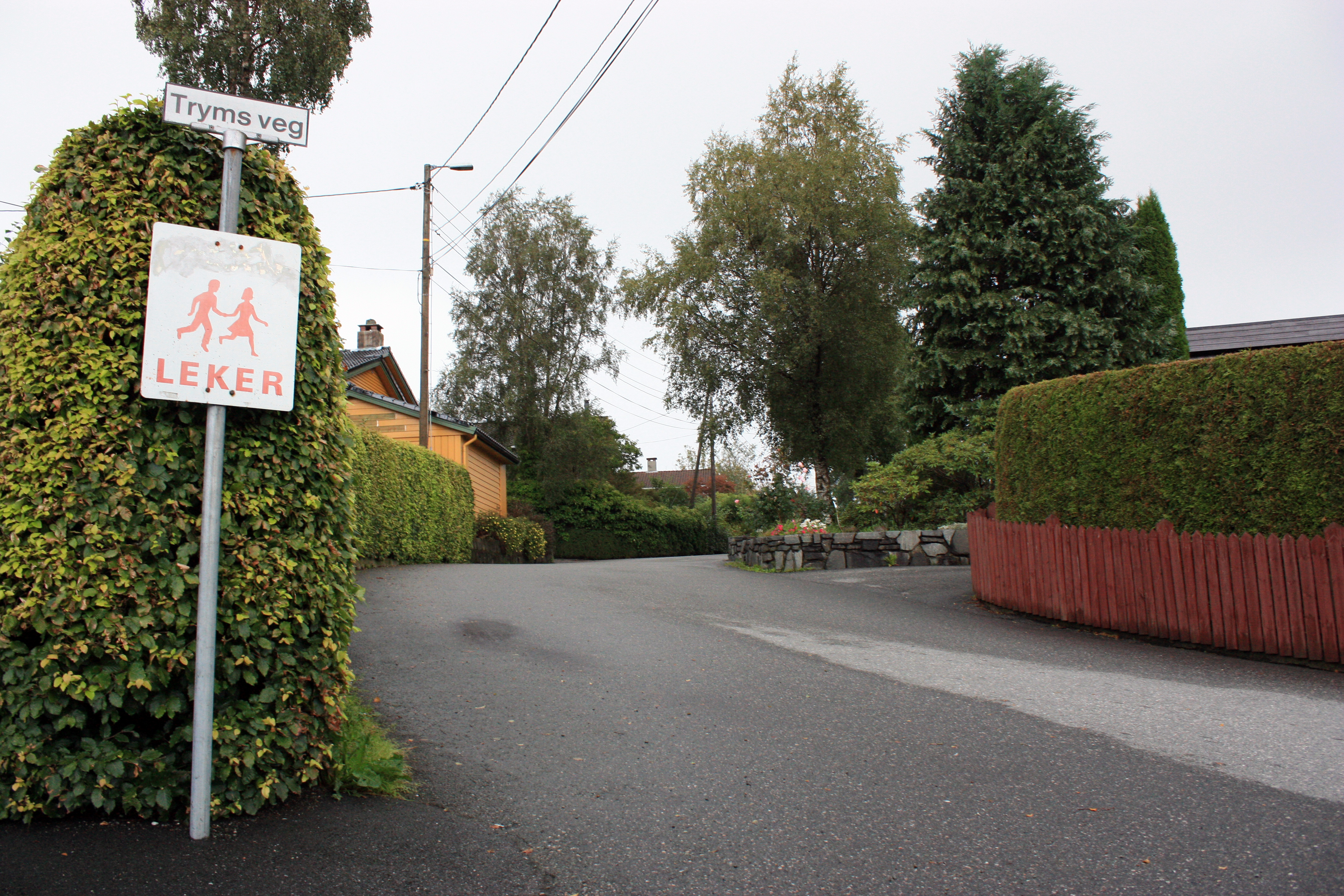 Tryms veg, Fana, Bergen.